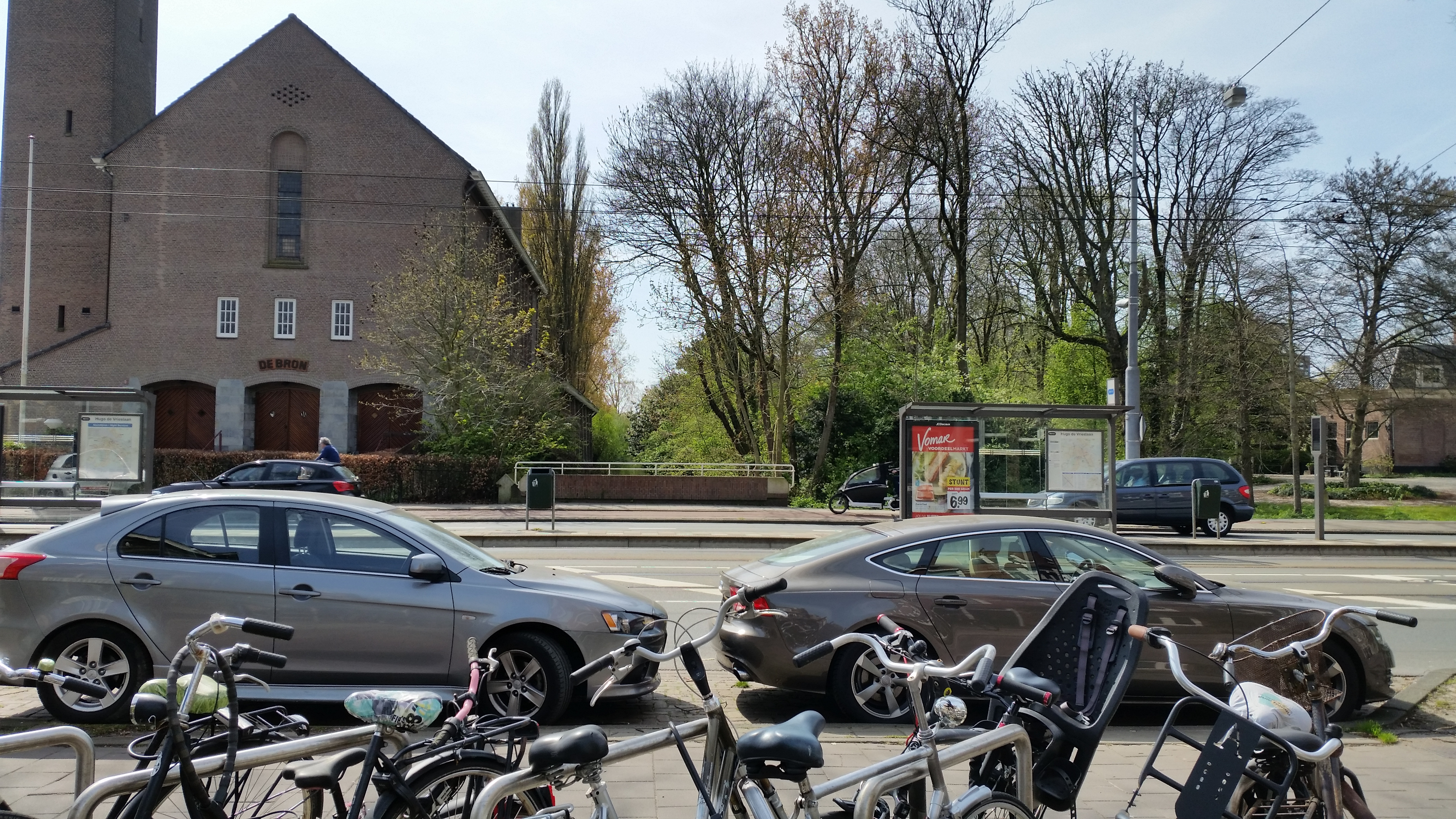 Impressie van de Frankendaelburg (brug 217) in de Middenweg, Amsterdam (april 2020)